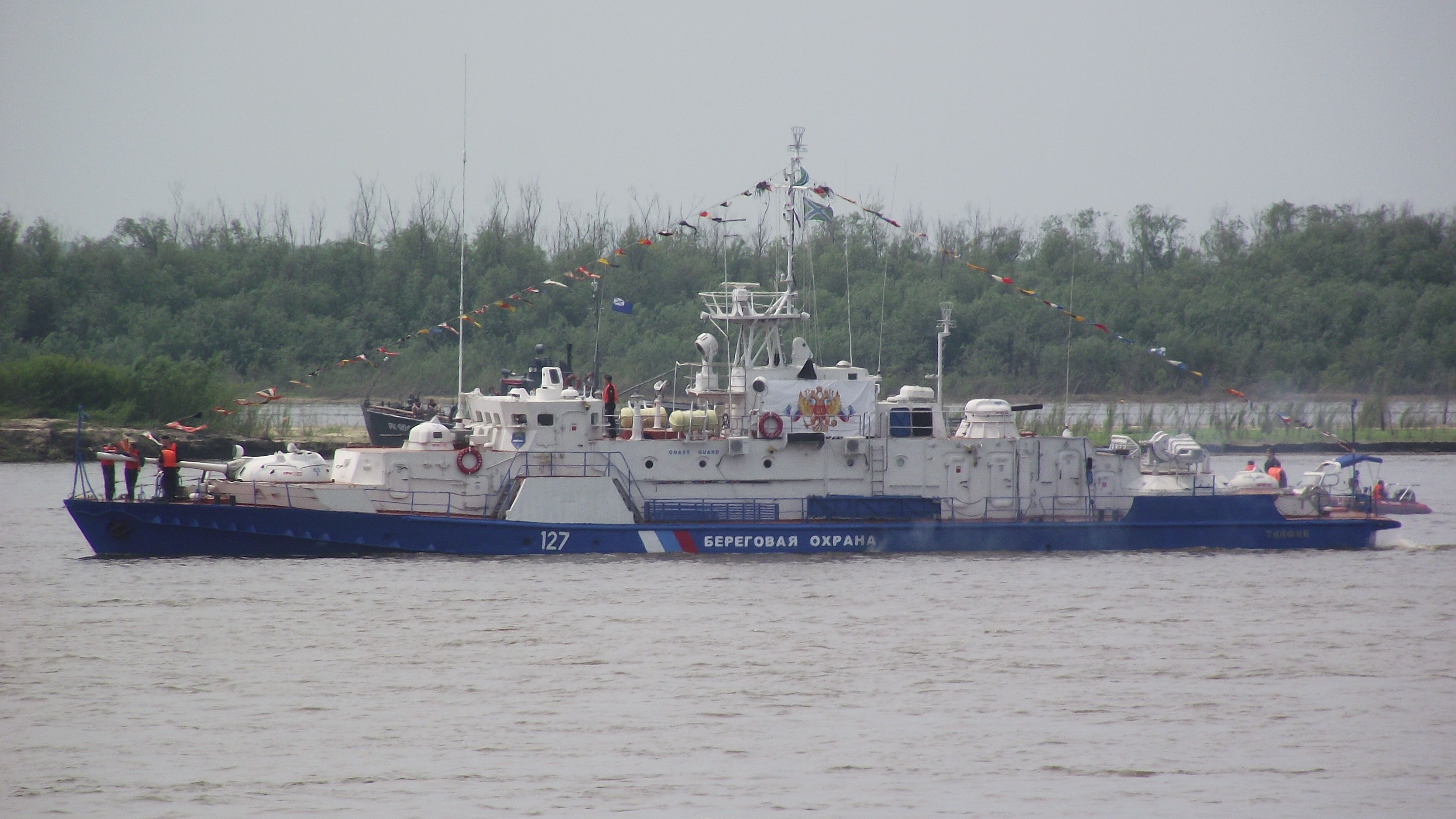 Корабль Амурской флотилии